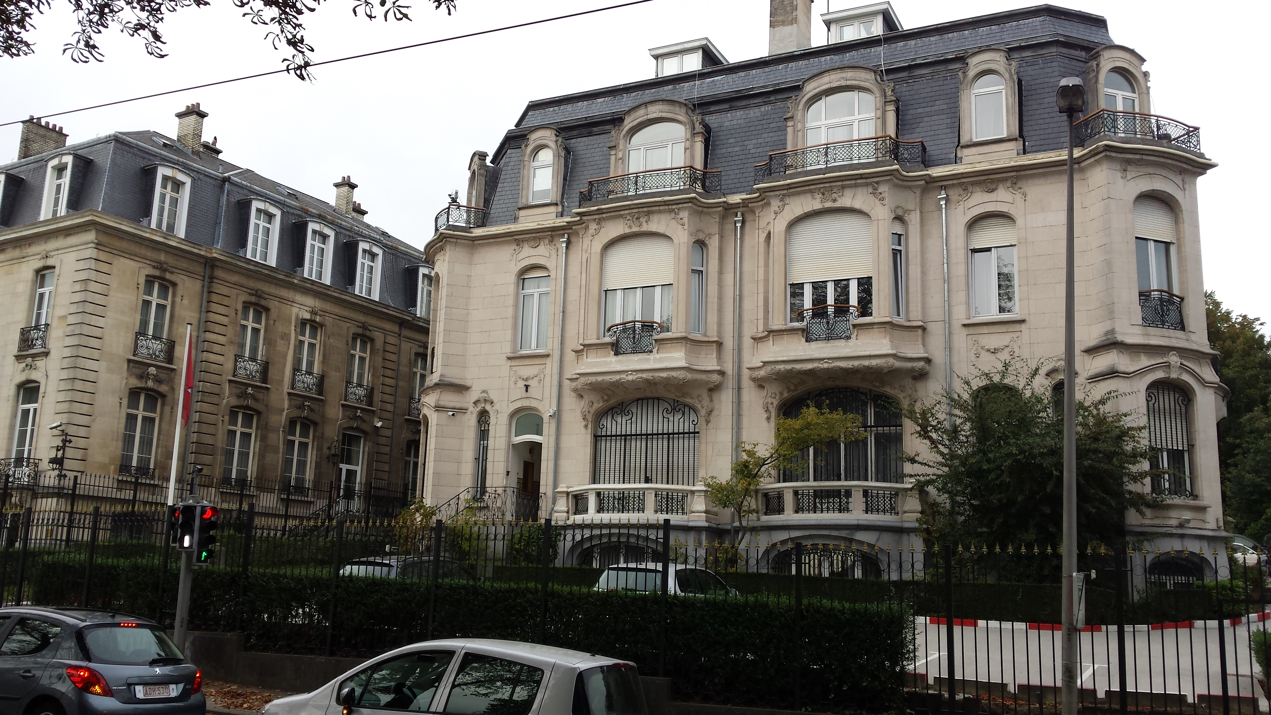 Ambasada Tunezji w Brukseli